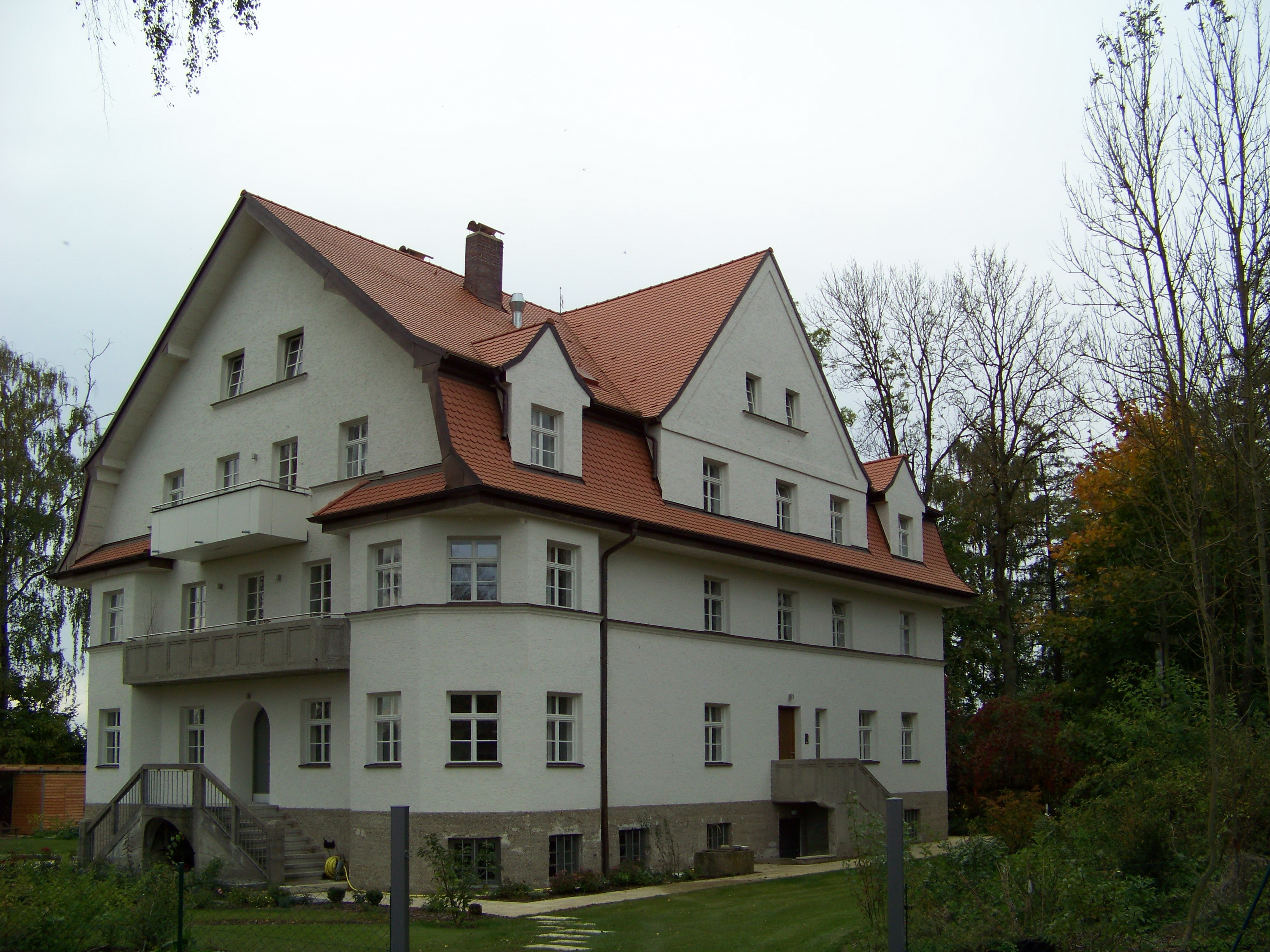 Geiselhöring, Kraburg 2. Wohnhaus. Zweigeschossiger Mansarddachbau mit Zwerchhaus, Eckerkern und Fassadengliederung, Anklänge an den Heimatstil, um 1922; Mühle, viergeschossiger Putzbau mit Flachdach, um 1950; mit technischer Ausstattung.